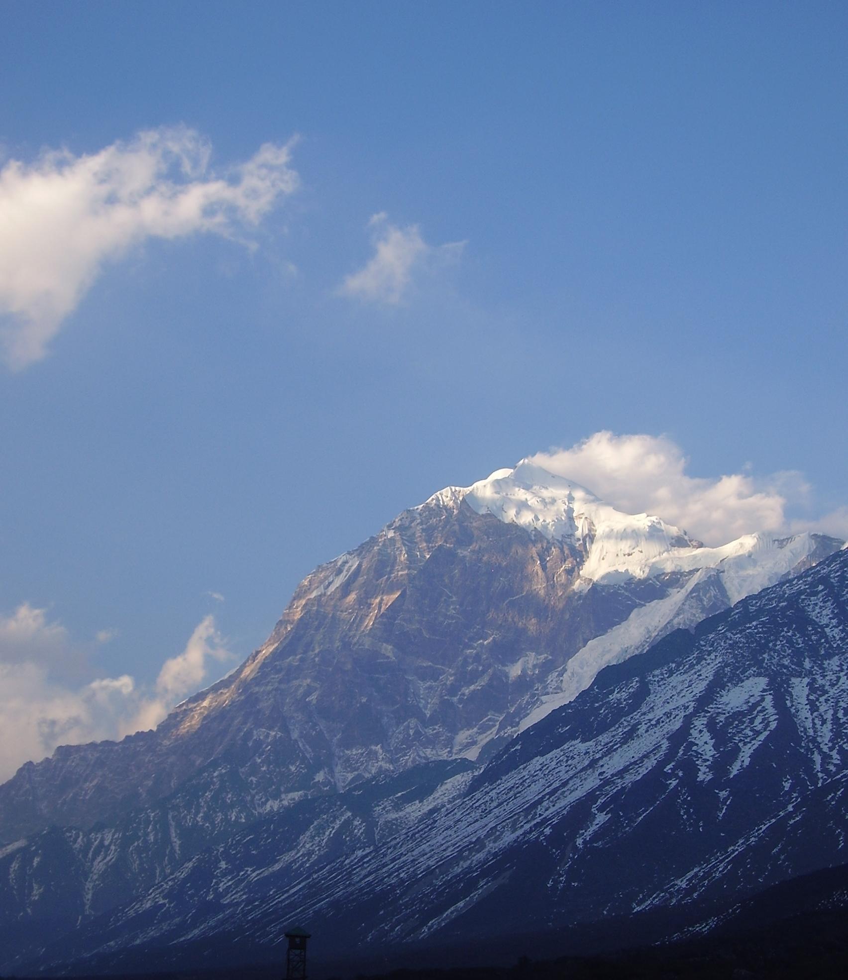 Mount Pandim in Sikkim, India.